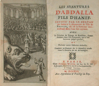 Title page of Les Avantures d'Abdulla, fils d'Hanif by Jean-Paul Bignon (1662-1743)